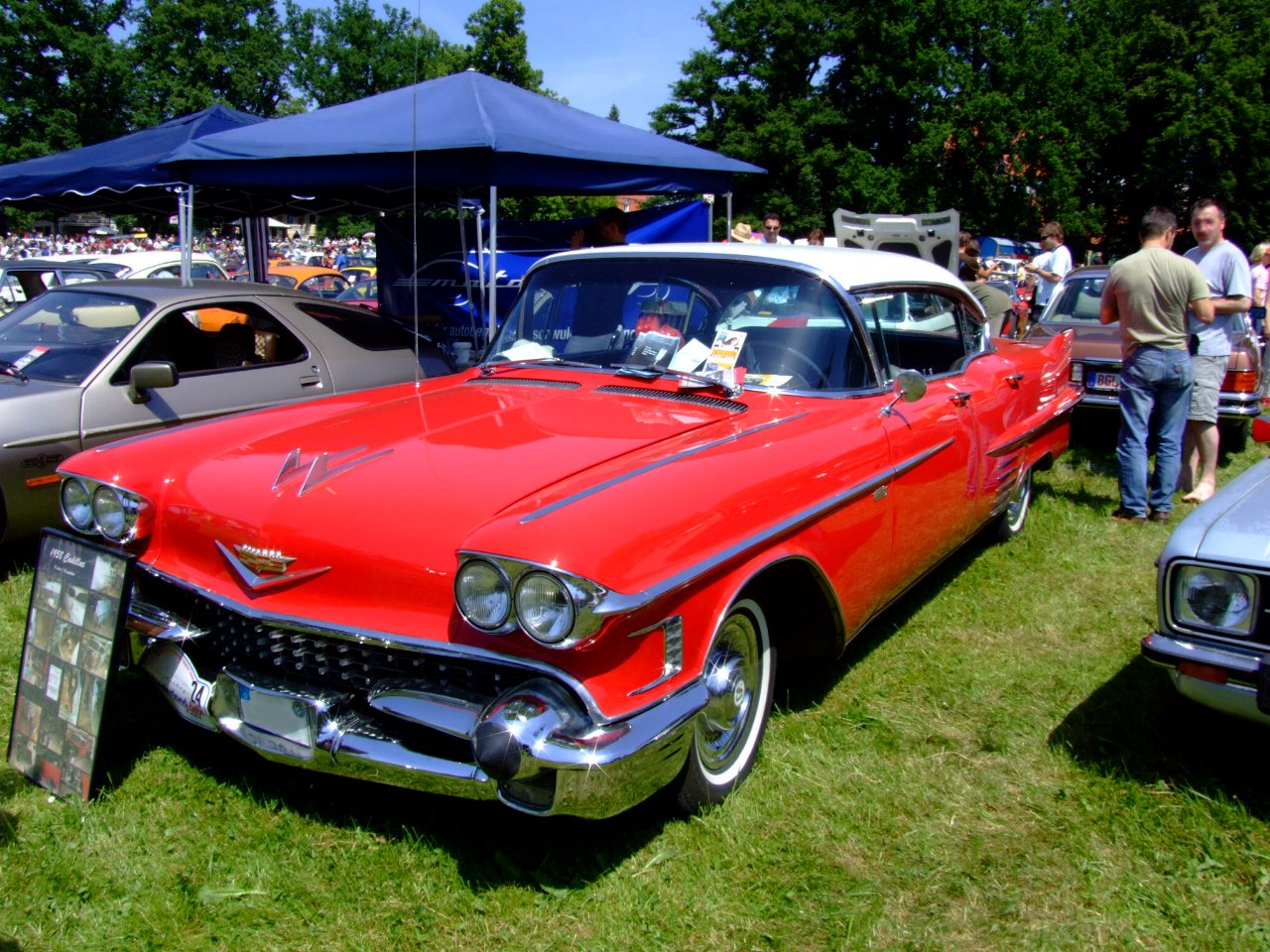 Cadillac Sedan DeVille, 1958, 310 PS Leergewicht: 2250kg Länge: 5,53 m, Breite: 2,05 m